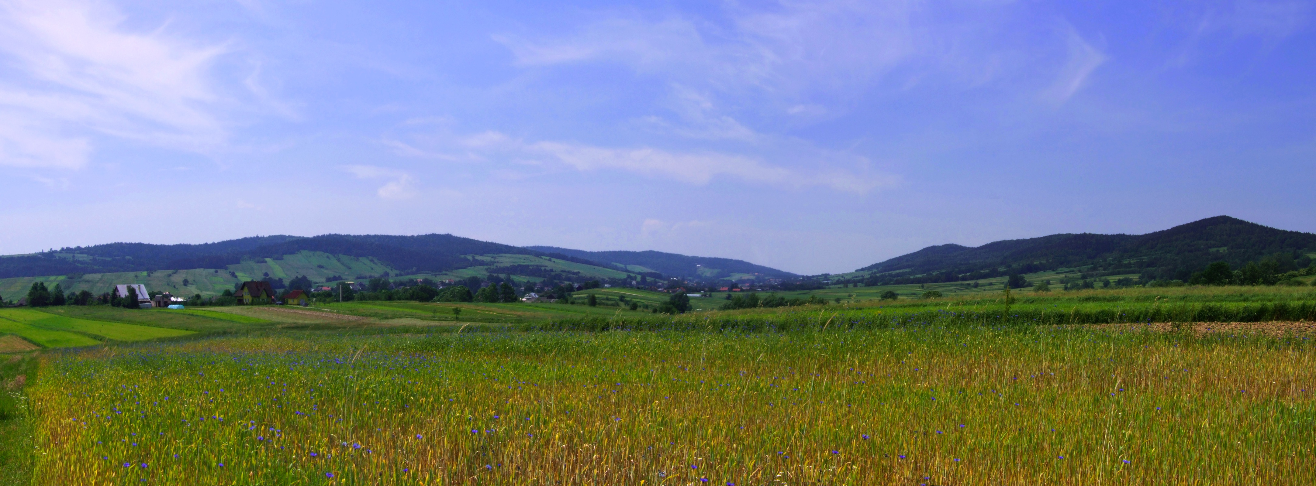 Pogórze Wiśnickie. Widok spod Bukowca w Iwkowej. od lewej strony: Sołtysie Kopy, Rogozowa, Piekarska Góra i Szpilowka